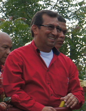 El Presidente Hugo Chávez acude al Consejo Nacional Electoral (CNE) el 11 de junio de 2012 para formalizar su candidatura para las elecciones del 7 de octubre. Presenta allí el Plan de la Patria como su proyecto de gobierno.